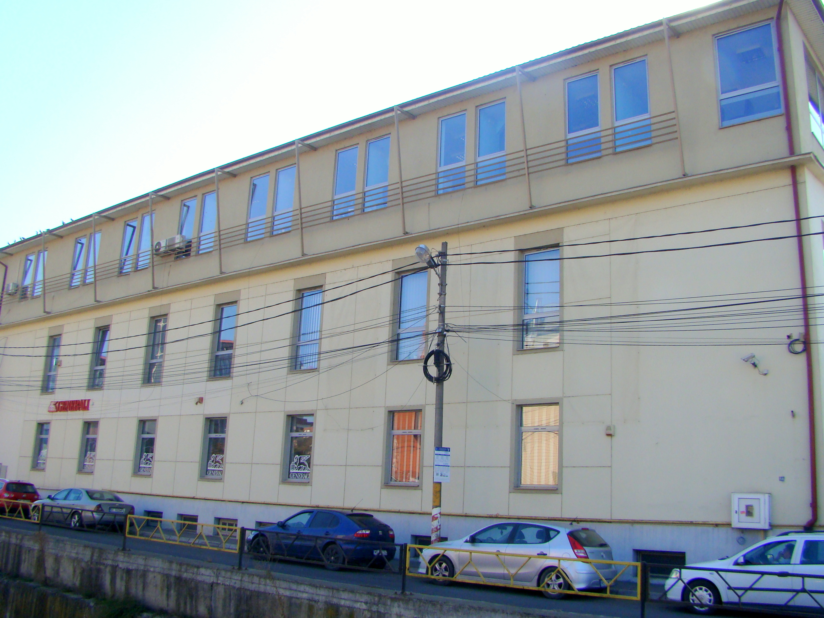 Depozitele orașului, municipiul Târgu Mureș, str. Vladimirescu Tudor 36 cca. 1900